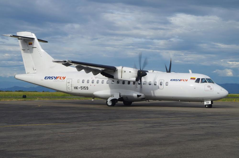 Avión ATR, miembro de la flota de EASYFLY